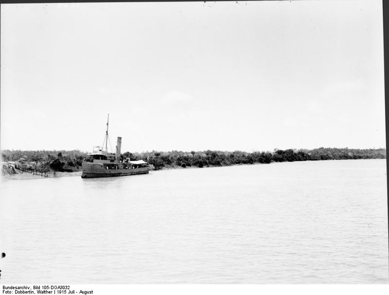 "Tabora" Lazarettschiff, Hospitalschiff Pegasus